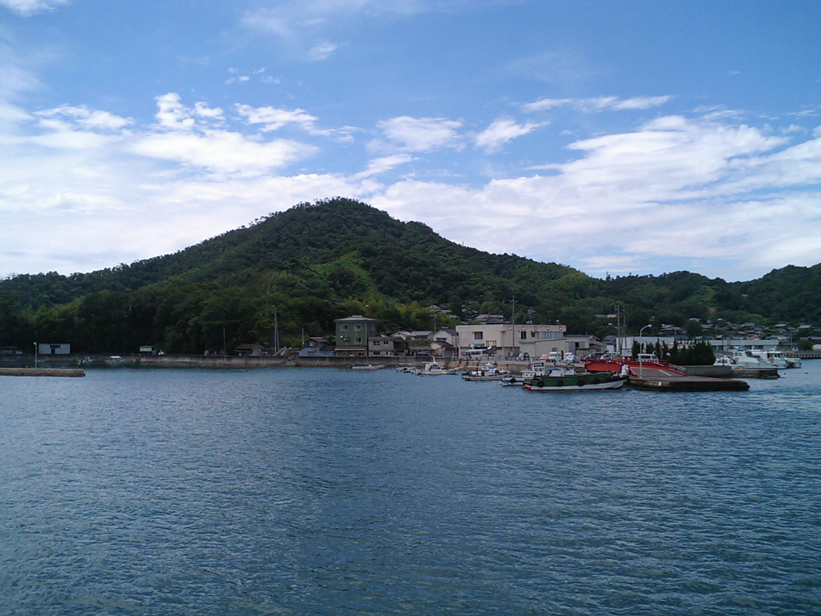 Momo shima